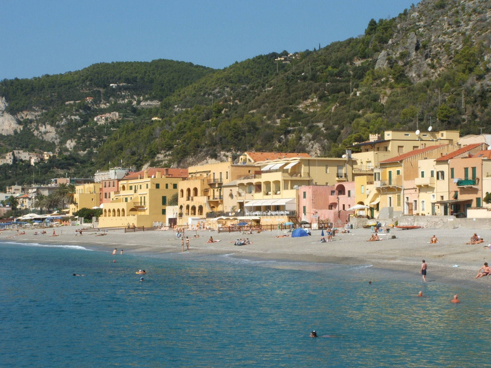 Immagine da Varigotti, frazione di Finale Ligure, riviera ligure di ponente, Liguria, Italia